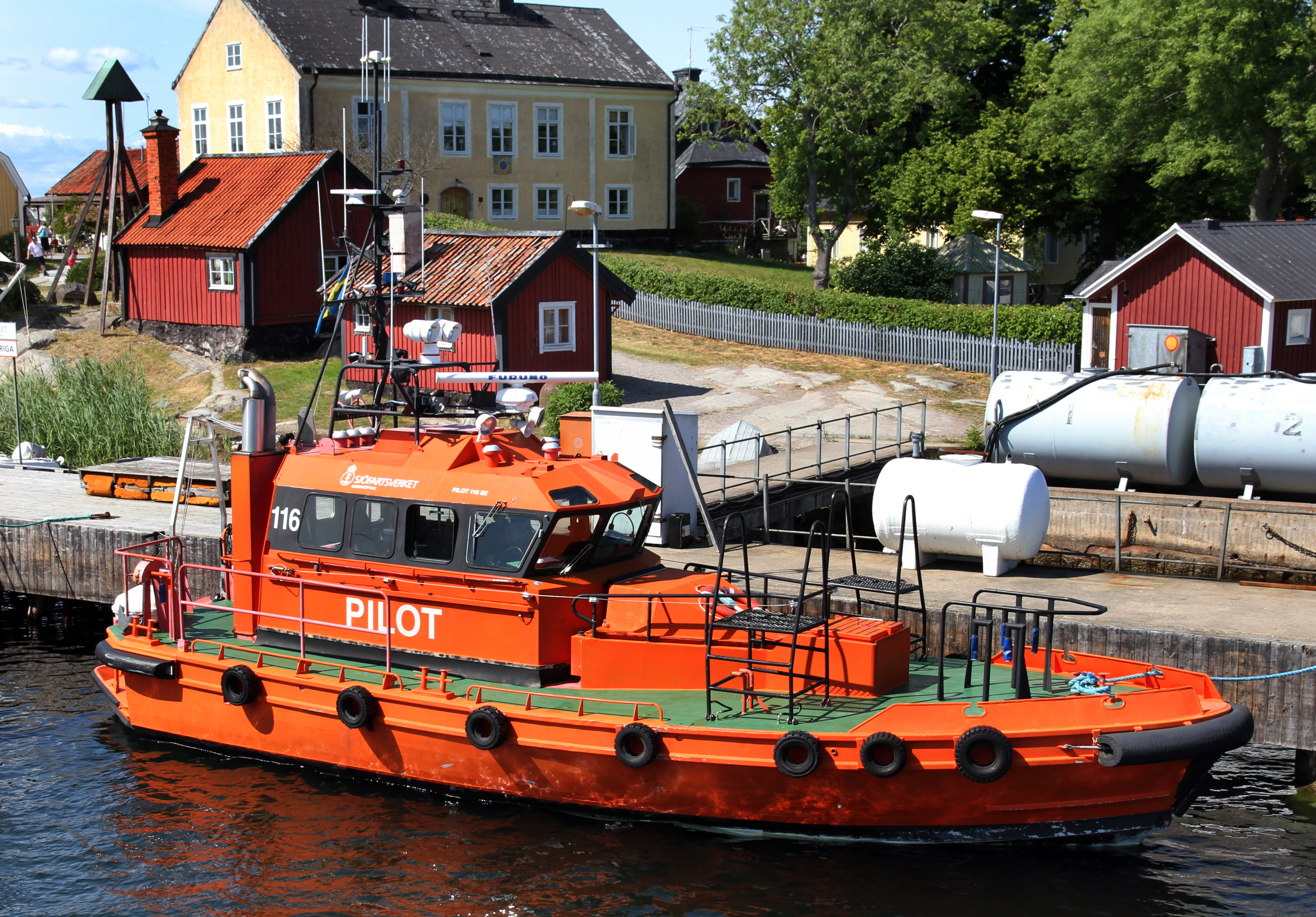 Pilot 116 SE i Sandhamn 6 juli 2013